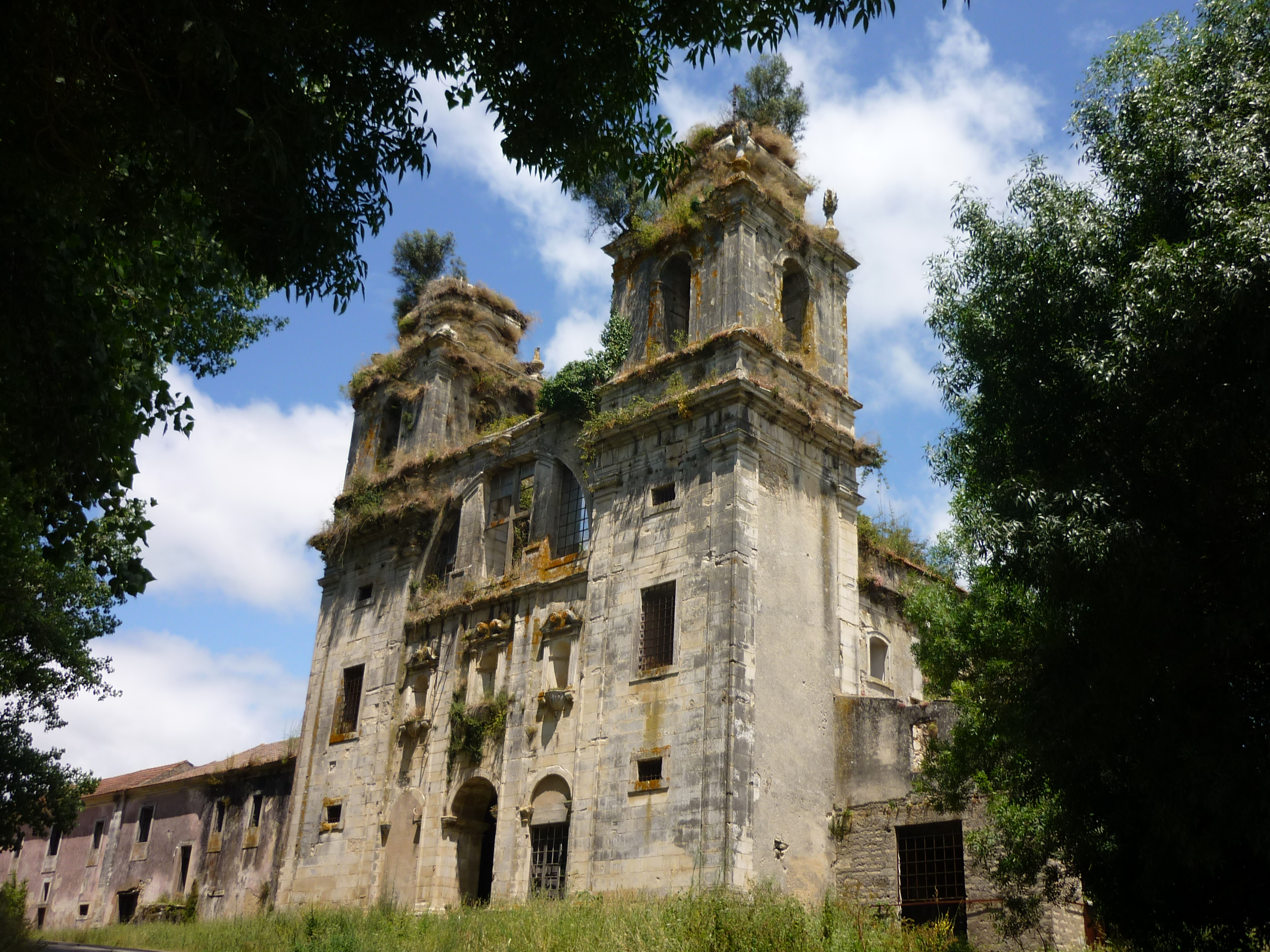 Klosterruine Seica, Portugal